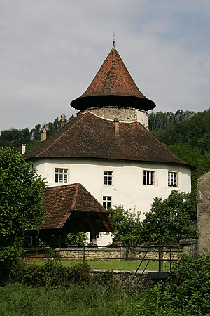 Schloss Zwingen